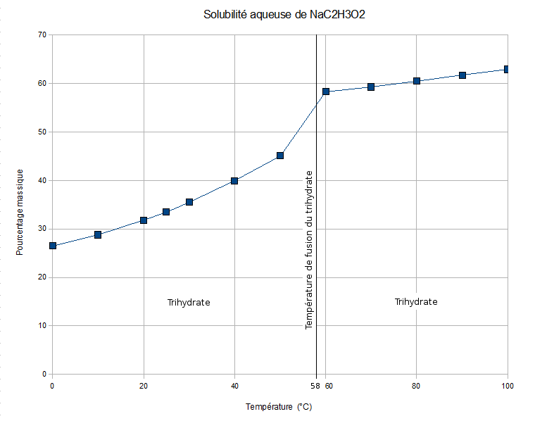 Solubilité aqueuse de l'acétate de sodium trihydraté